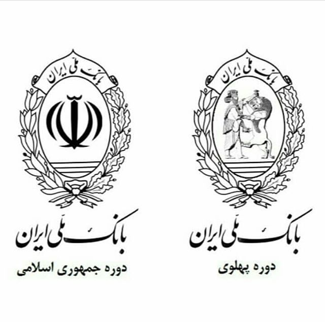 لوگوی انتخابی بانک ملی ایران از نگاره های تخت جمشید در زمان تأسیس این بانک و تغییر آن به نشان رسمی جمهوری اسلامی بعد از انقلاب 1357